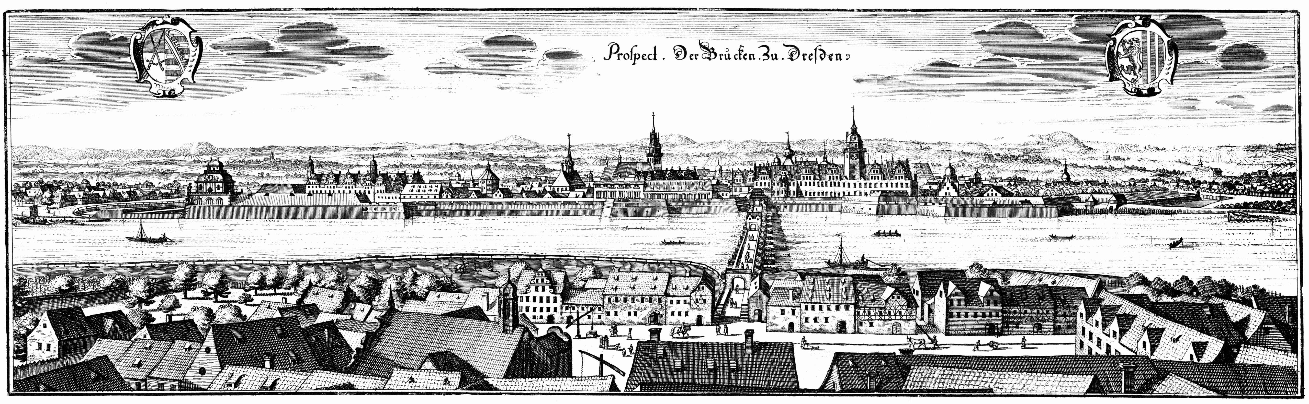 Stadtansicht von Dresden, angefertigt von Matthäus Merian.